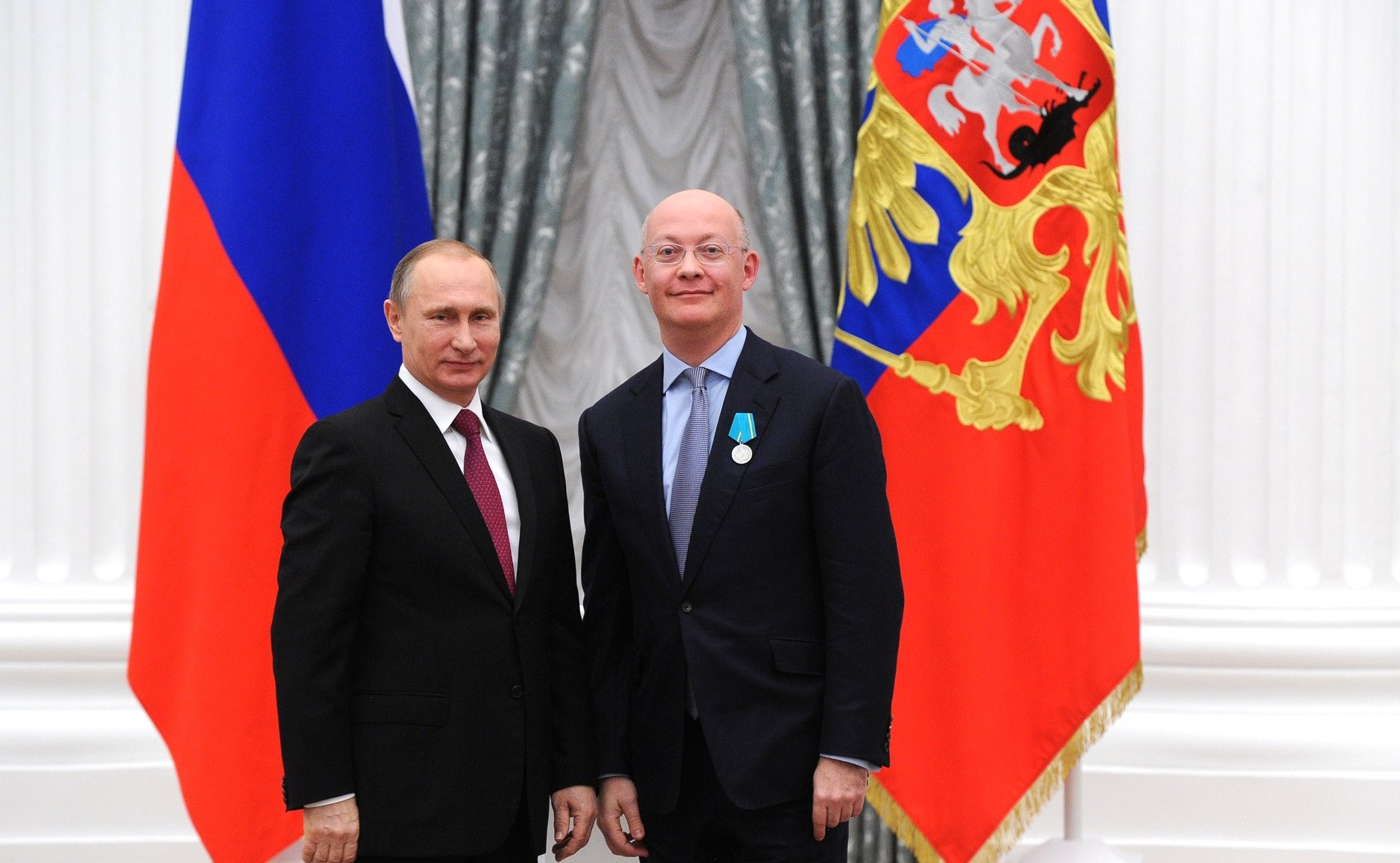 На церемонии вручения государственных наград Российской Федерации. Медалью Пушкина награждён директор Музея науки Великобритании Иан Крейг Блэтчфорд.